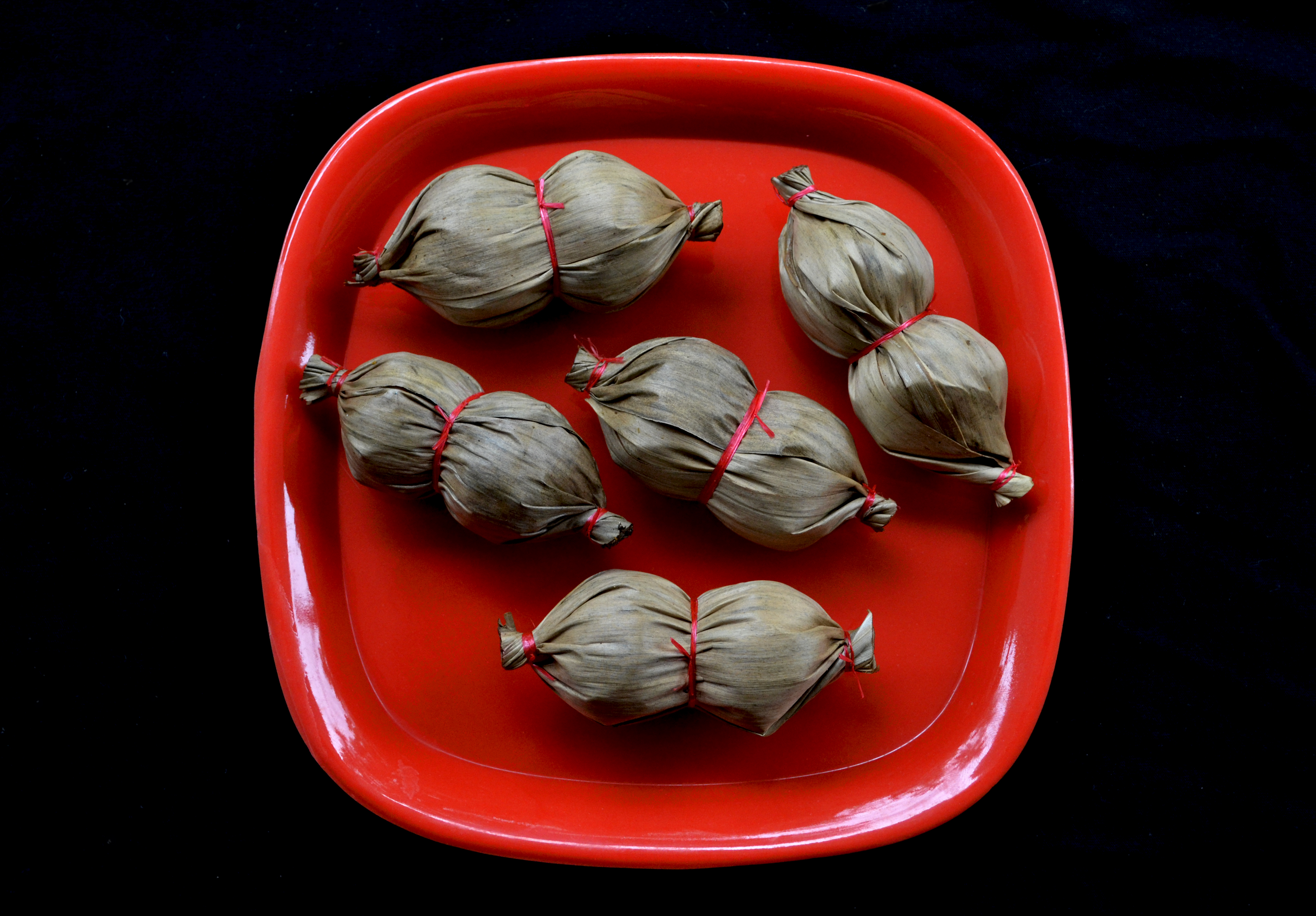 ദ്വീപ്‌ ഹല്‍വ അഥവാ ദ്വീപ്‌ ഉണ്ട ലക്ഷദ്വീപിലെ പരമ്പരാഗതമായതും വിത്യസ്തമായതുമായ ഒരു പലഹാരം. ചിരകിയ തേങ്ങയും ദ്വീപ്‌ ശര്‍ക്കരയും (നമ്മുടെ തെങ്ങിന്‍ ശര്‍ക്കര തന്നെ - മീര എന്ന തെങ്ങിന്‍ പാനീയം കുറുക്കിയാണ് ദ്വീപ്‌ ശര്‍ക്കര ഉണ്ടാക്കുന്നത്‌.) ഉരുളിയില്‍ ഇട്ടു ഇളക്കി വേവിച്ചു പതം വരുന്ന വിധത്തില്‍ പാകമായ ശേഷം ഏലക്കാ പൊടിയും മറ്റു ചില ചേരുവകളും ചേര്‍ത്ത് ഇളക്കിയെടുത്ത് ചെറു ഉരുളകളാക്കി ഉണങ്ങിയ വാഴയിലകളില്‍ പൊതിഞ്ഞെടുക്കുന്നു. ആഴ്ചകളോളം കേടുകൂടാതെയിരിക്കും ഇവ.